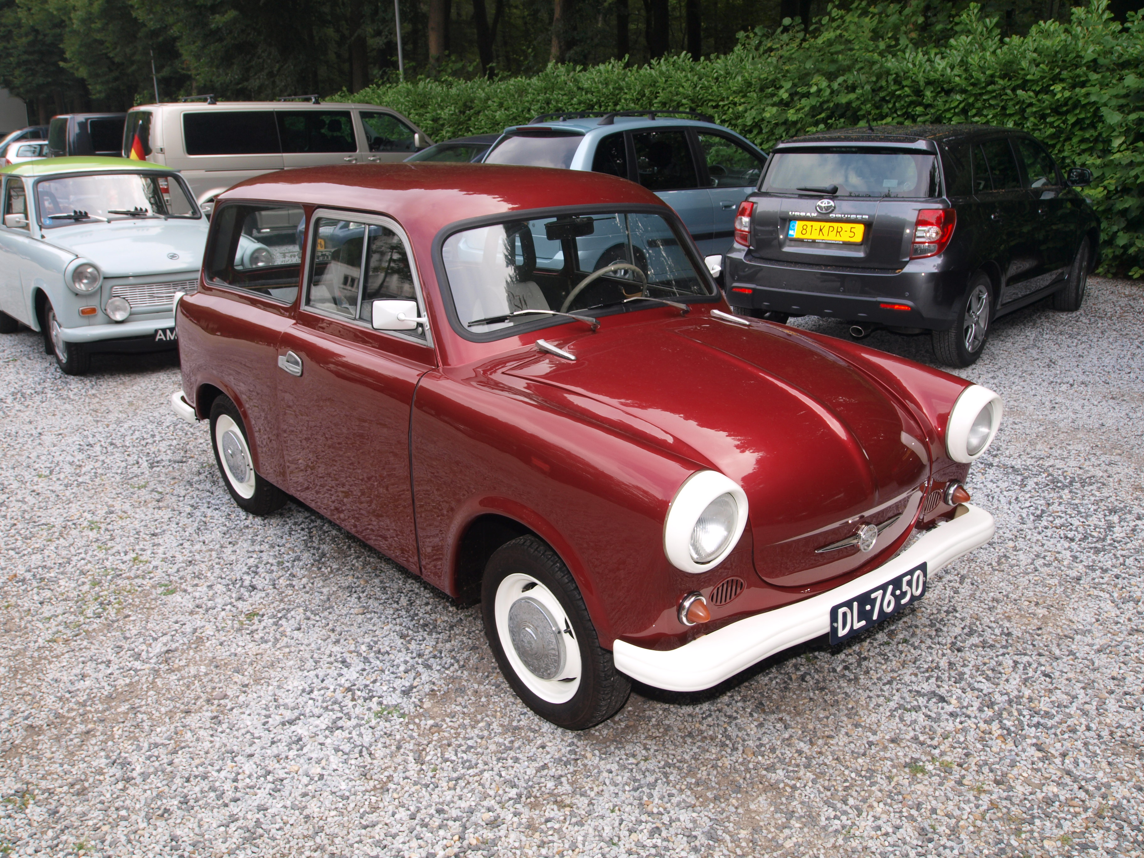 1964 Trabant P60